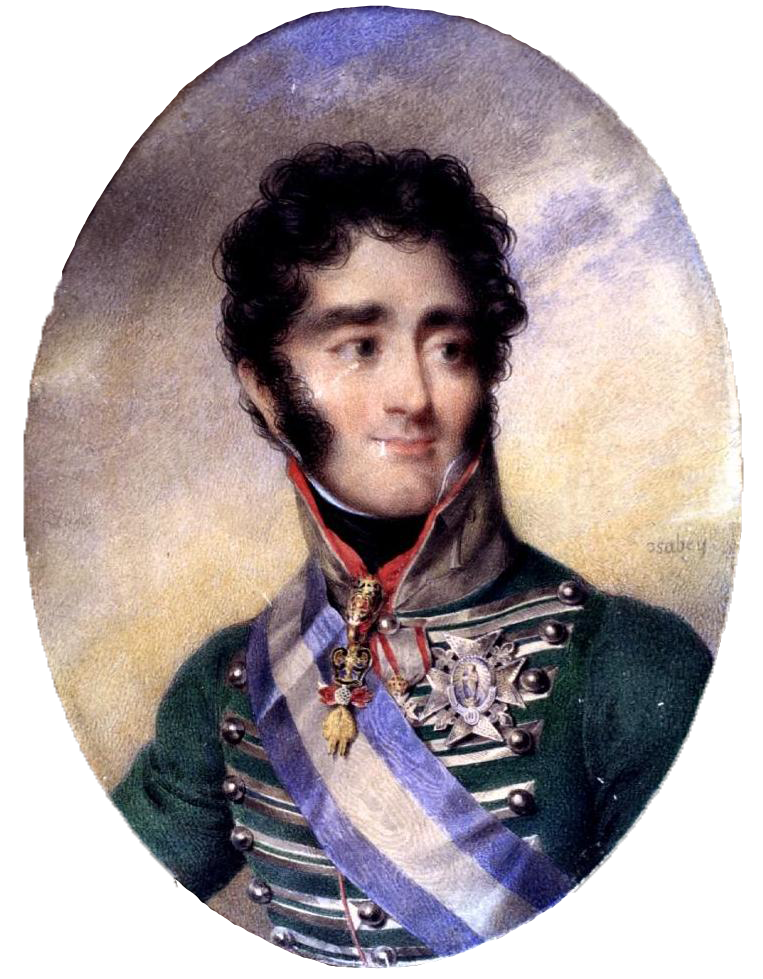 Retrato de busto mirando hacia la derecha sobre fondo nuboso. Viste casaca verde con entorchados de plata. Condecoraciones: banda y cruz de la Orden de Carlos III y el Toisón. Delicado puntillismo a la hora de aplicar el color, disponiendo las diminutas líneas con su característico trazado de arriba abajo. Dibujo realizado con lápiz negro claramente visible, sobre todo en los cabellos,. En los ojos, en las vestiduras y los adornos que las complementan. (ESPINOSA MARTÍN, M. Carmen.